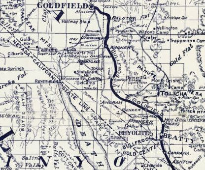 Map showing Bullfrog Goldfield Railroad in Nevada, circa 1907